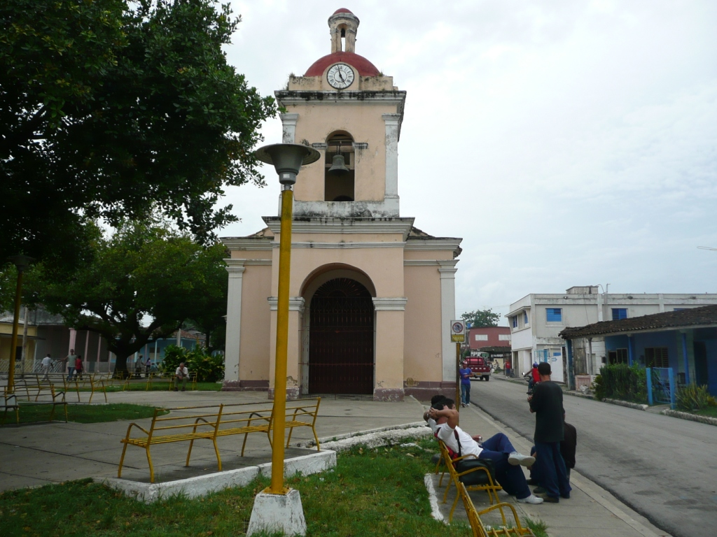 Chiesa cattolica di San Antonio de las Vueltas (Cuba)